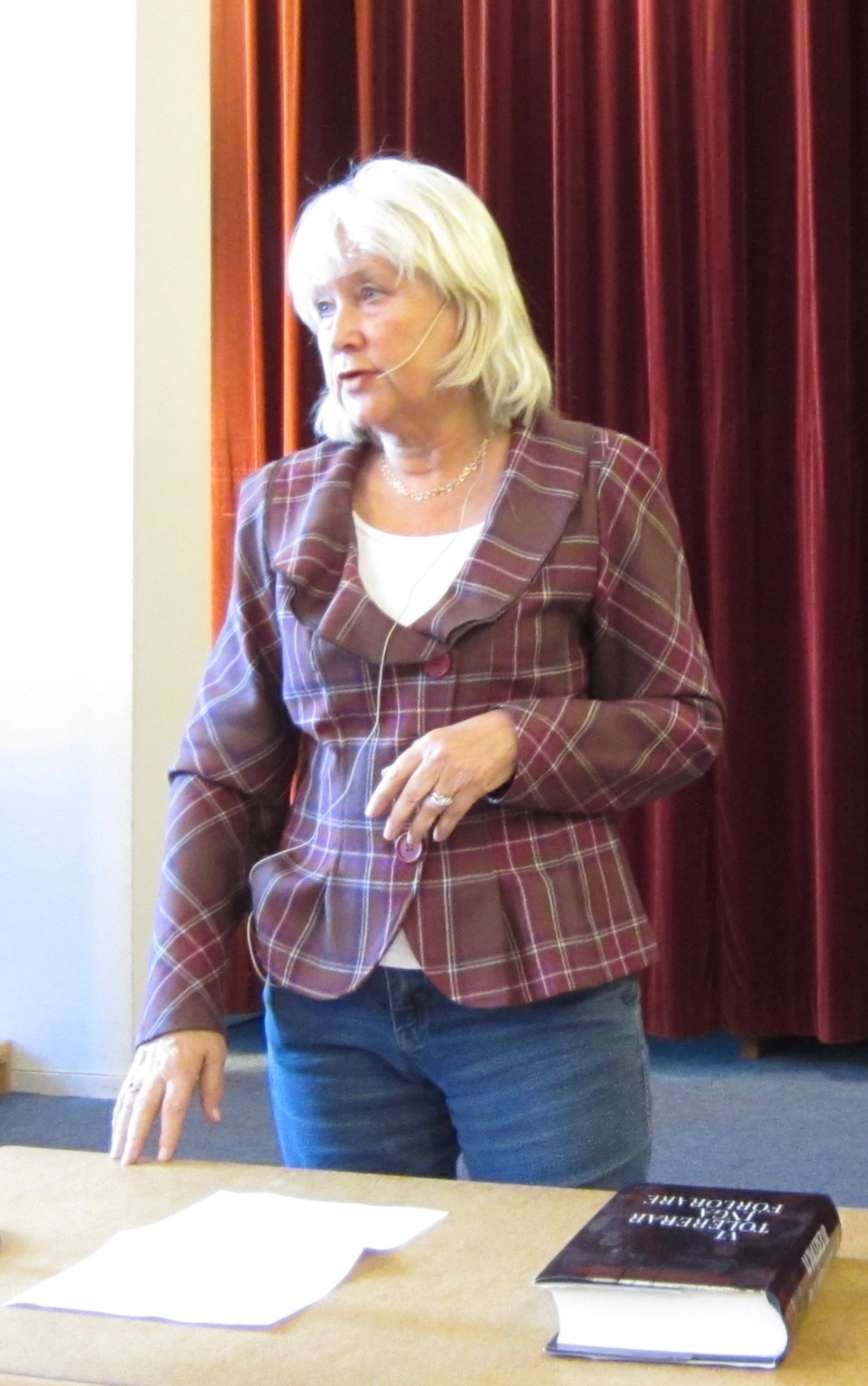 Journalisten och författaren Britt-Marie Mattsson, 2012